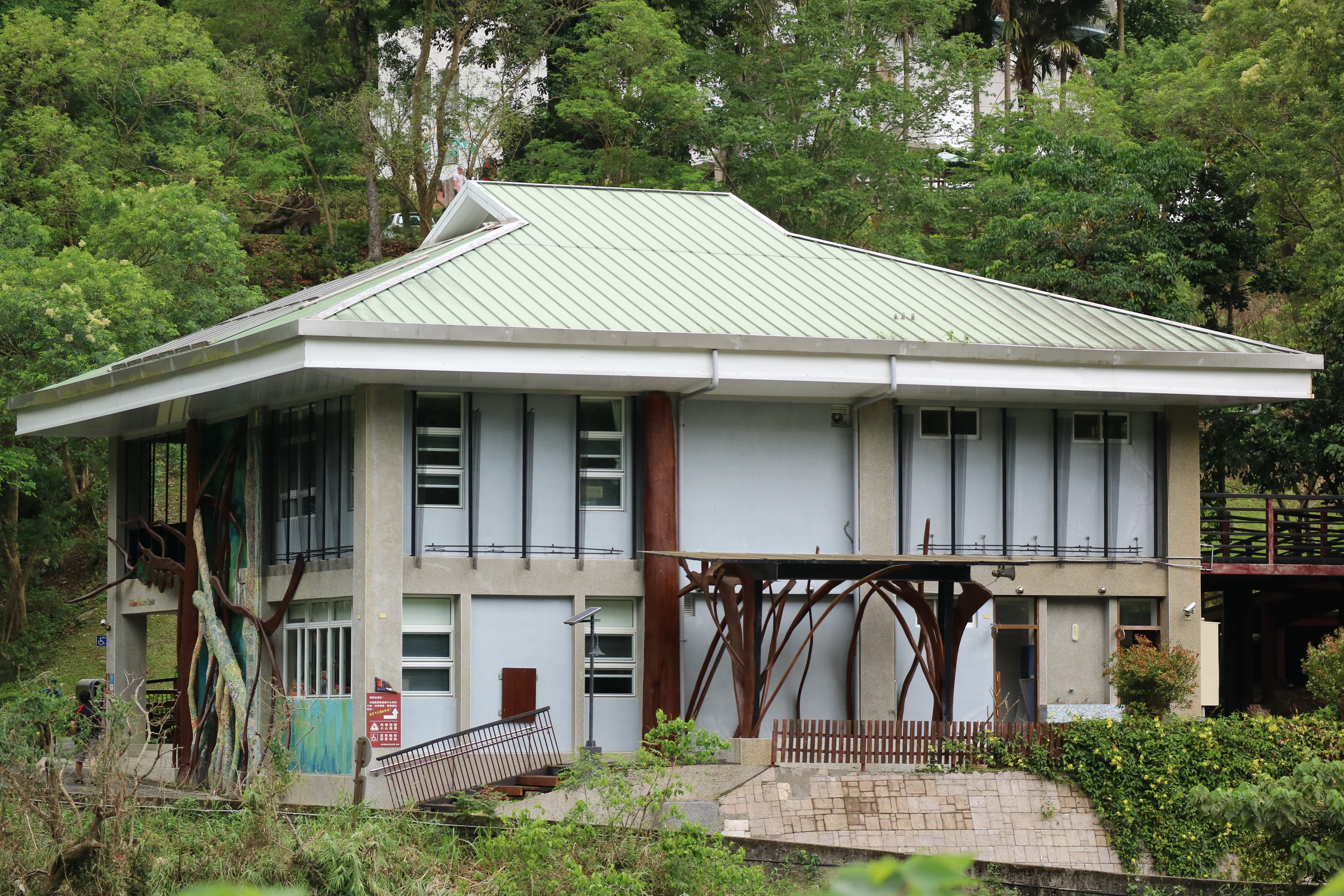 行政院農業委員會林務局知本自然教育中心